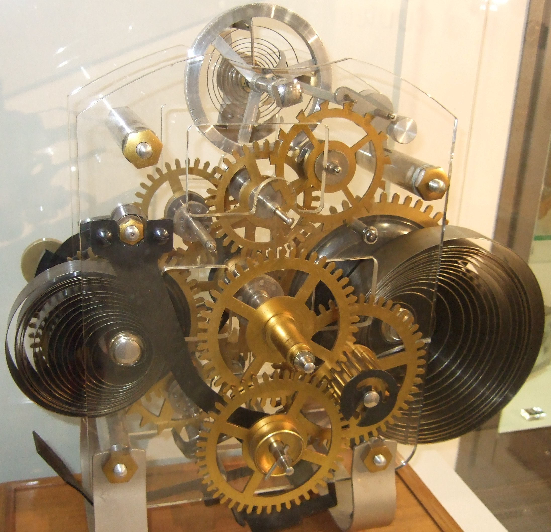 überdimensionales Modell des Werkes eines Weckers